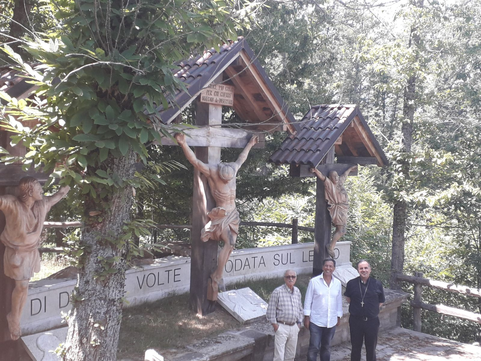 Il Calvario delle Orie, visitato dal Vescovo di Rieti, Mons. Domenico Pompili, Luglio 2018